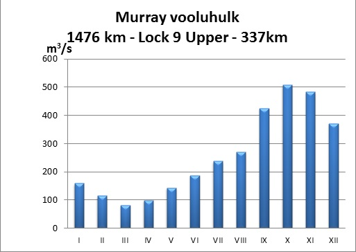 Murray jõe hüdrofraaf